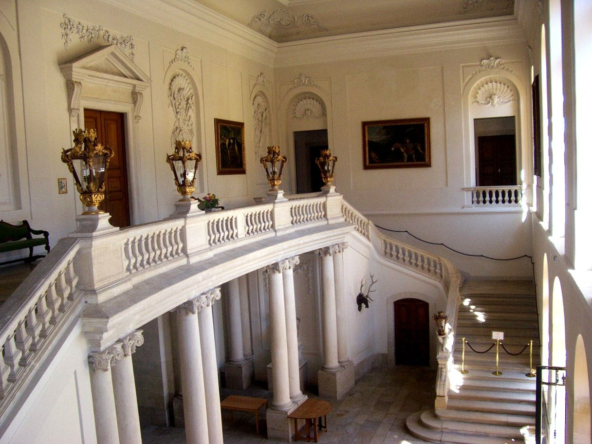 Eckartsau, schodisko